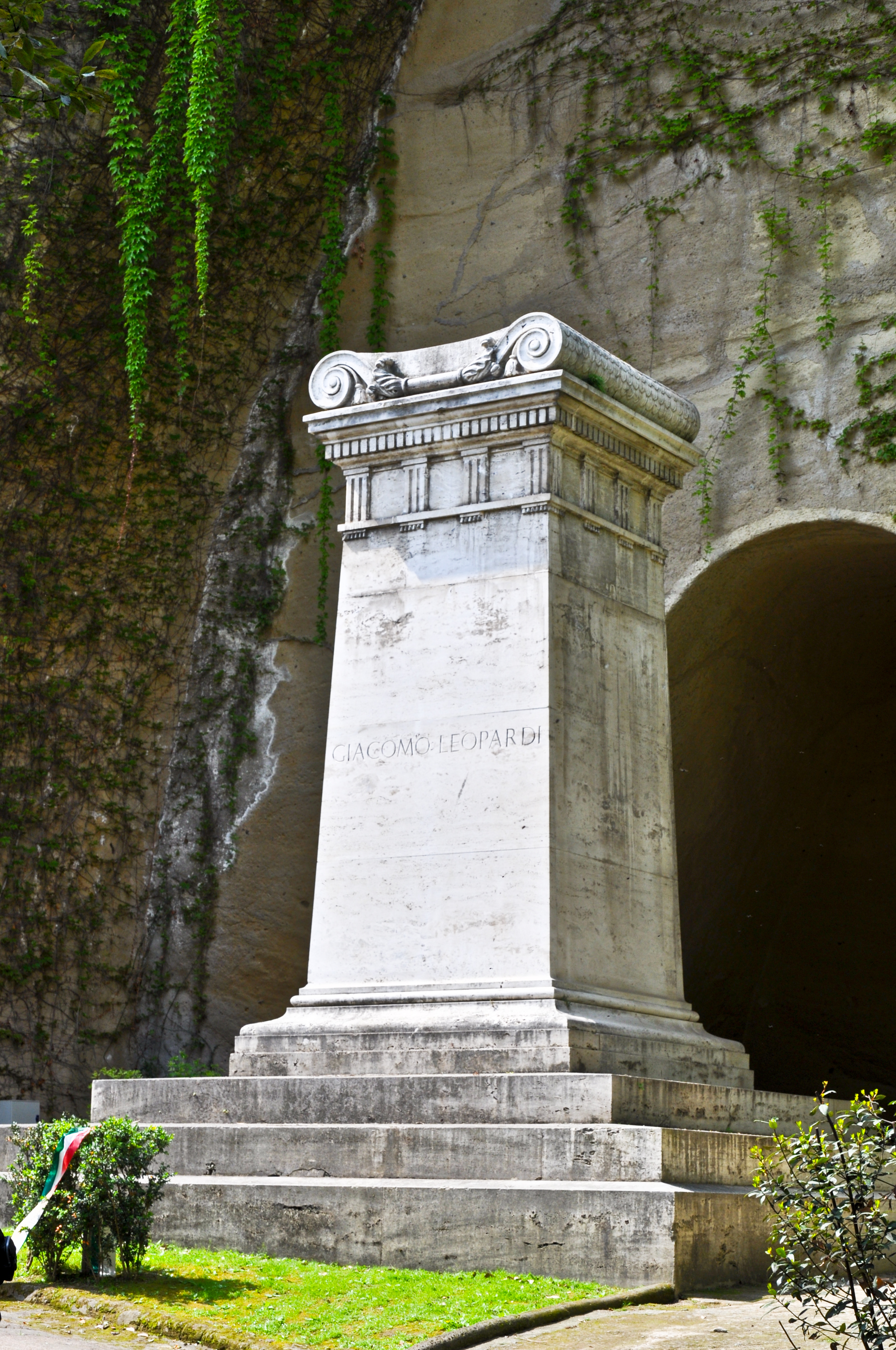 Monumento funebre di Giacomo Leopardi - Parco Vergiliano, Napoli.